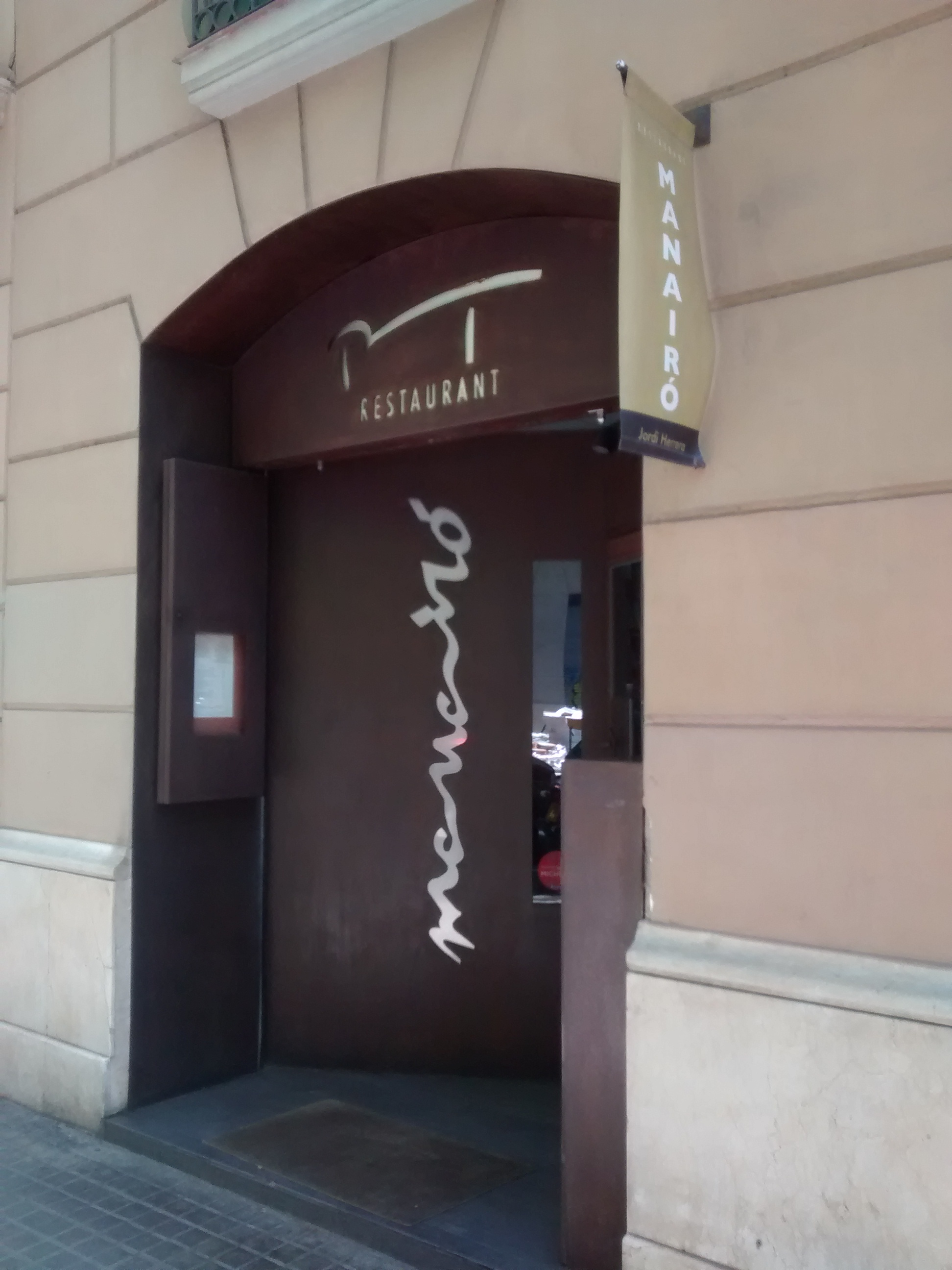 Manairó, a restaurant in Barcelona.